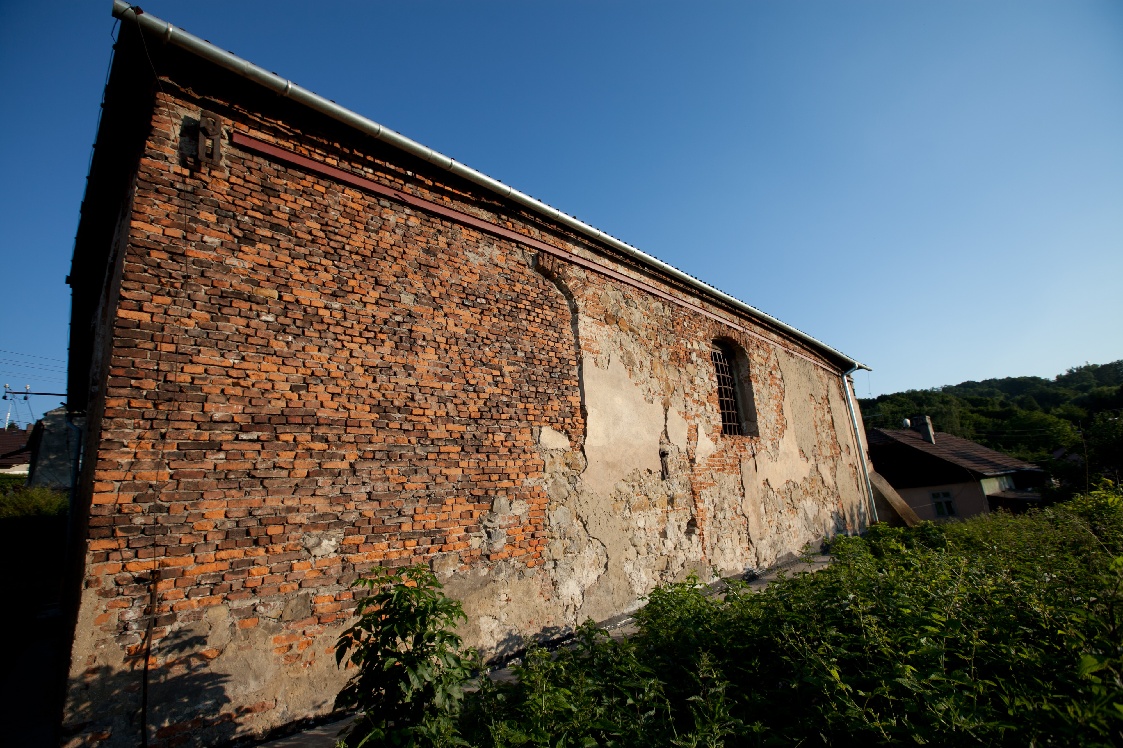 Stara Synagoga w Wieliczce, ul. Wiejska 11, dzielnica Klasno, ściana zachodnia